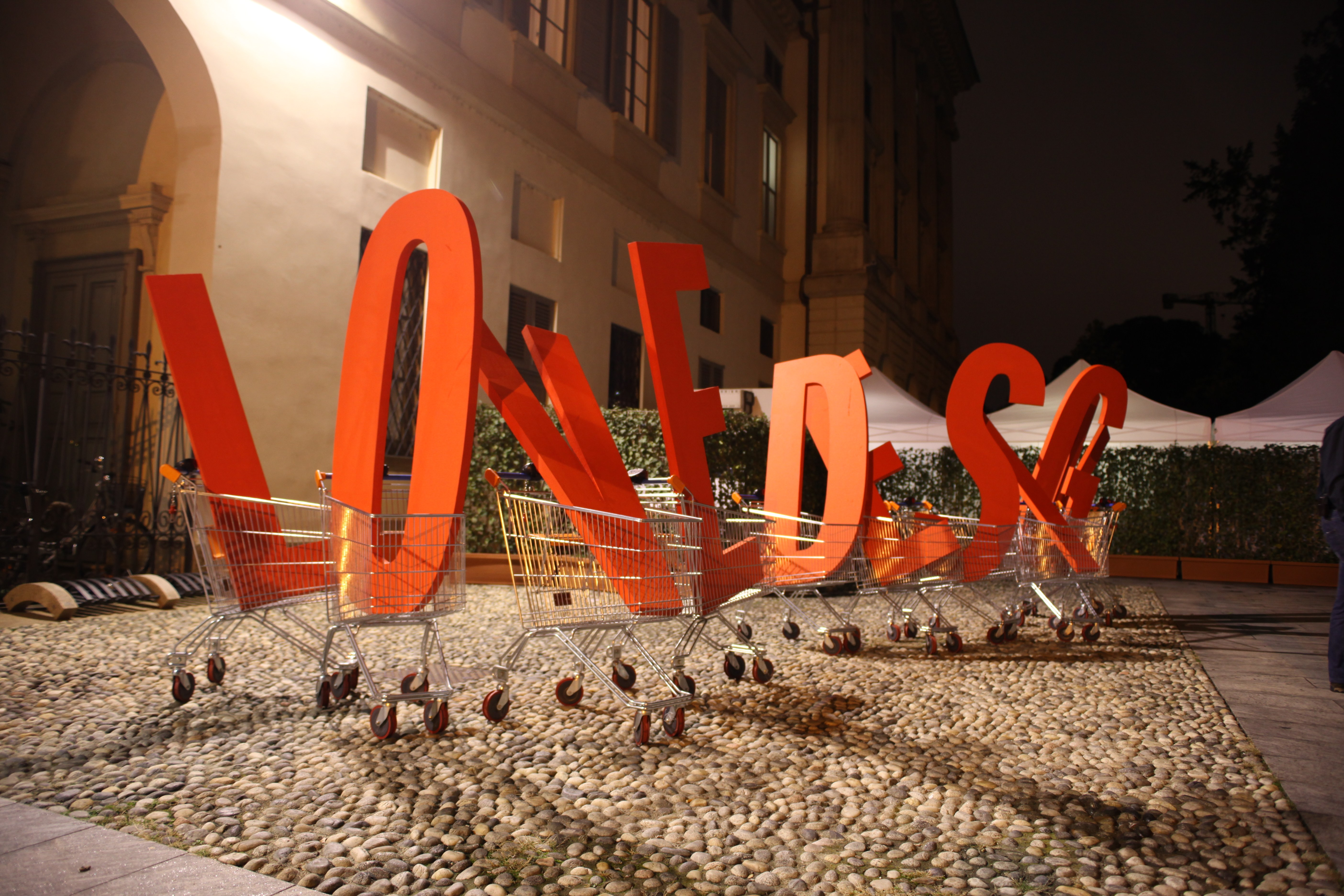 Love Design è una grande Mostra Mercato pensata per tutti gli amanti del design, dell’arredamento e dell’arte in generale che, grazie al patrocinio del Comune di Milano-Cultura, verrà ospitata per la prima volta quest’anno nella più prestigiosa sede pubblica milanese dedicata all’arte contemporanea, il PAC-Padiglione d’Arte Contemporanea, da venerdì 23 a domenica 25 ottobre 2009. Straordinaria iniziativa nata nel 2003 e giunta alla sua quarta edizione, è promossa congiuntamente da AIRC Associazione Italiana per la Ricerca sul Cancro-Comitato Lombardia e da ADI Associazione per il Disegno Industriale, con il duplice obiettivo di sostenere la ricerca sul cancro, (nell’edizione 2007 sono stati raccolti 400 mila euro) e insieme creare un volano di interesse intorno al design italiano: da un lato promuovere una nuova forma di sensibilizzazione sull’attività svolta da AIRC e raccogliere fondi per alimentarla e sostenerla, dall’altro creare una nuova occasione per divulgare il design all’interno di un più vasto contesto culturale coinvolgendo la vita sociale di Milano.